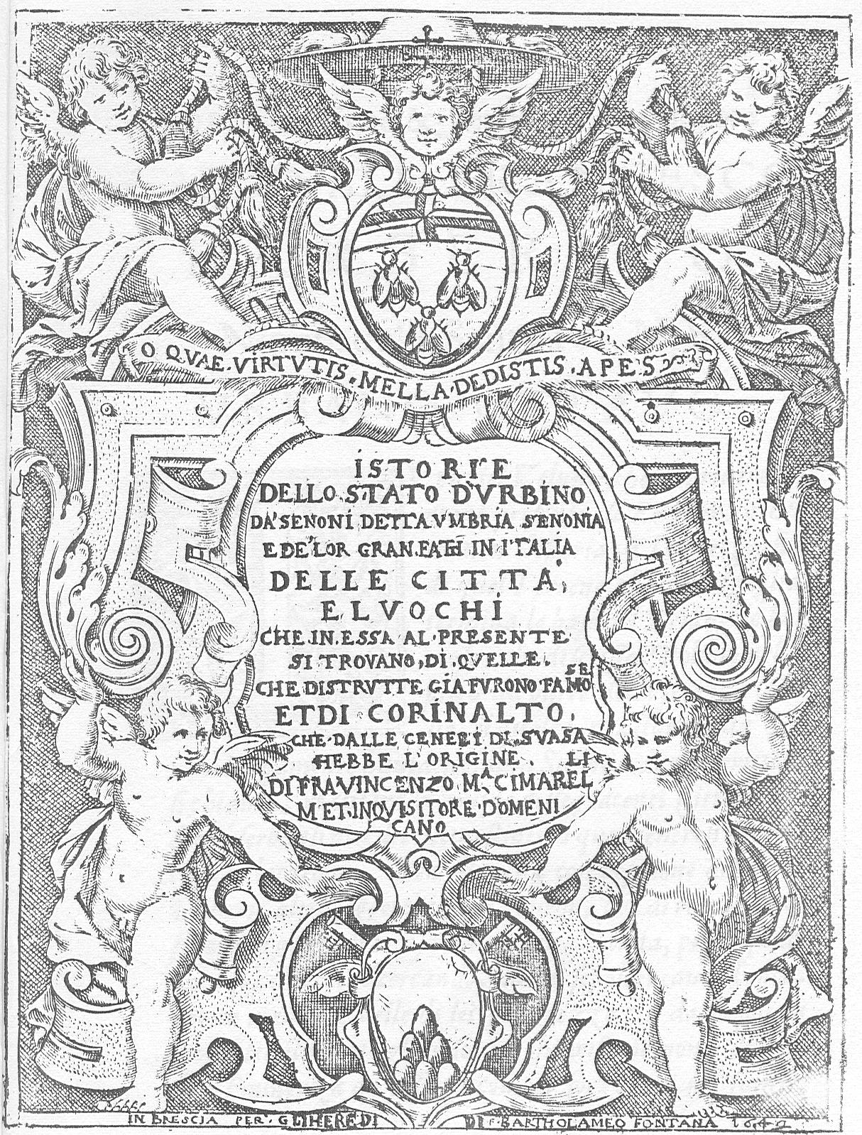 Istorie dello Stato di Urbino - Copertina